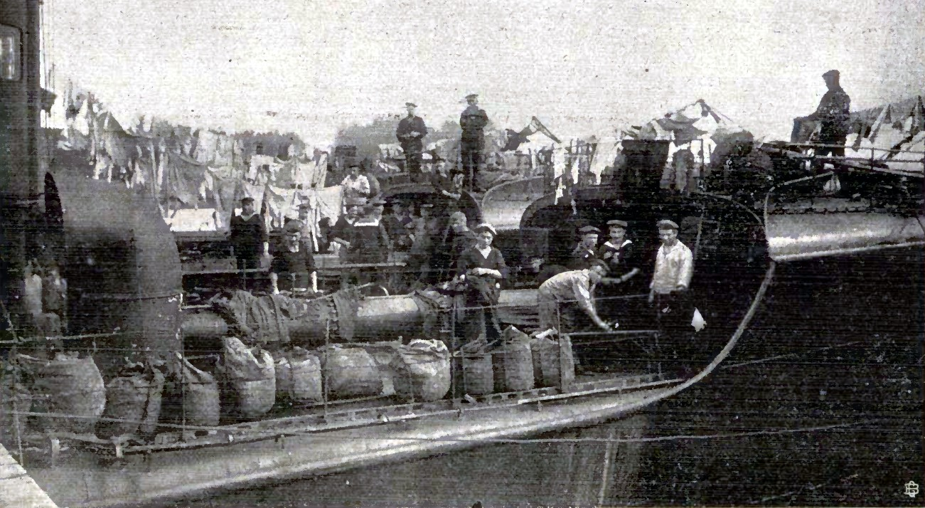 Blick über eine Torpedoflottille an der Zollbrücke im Travemünde.